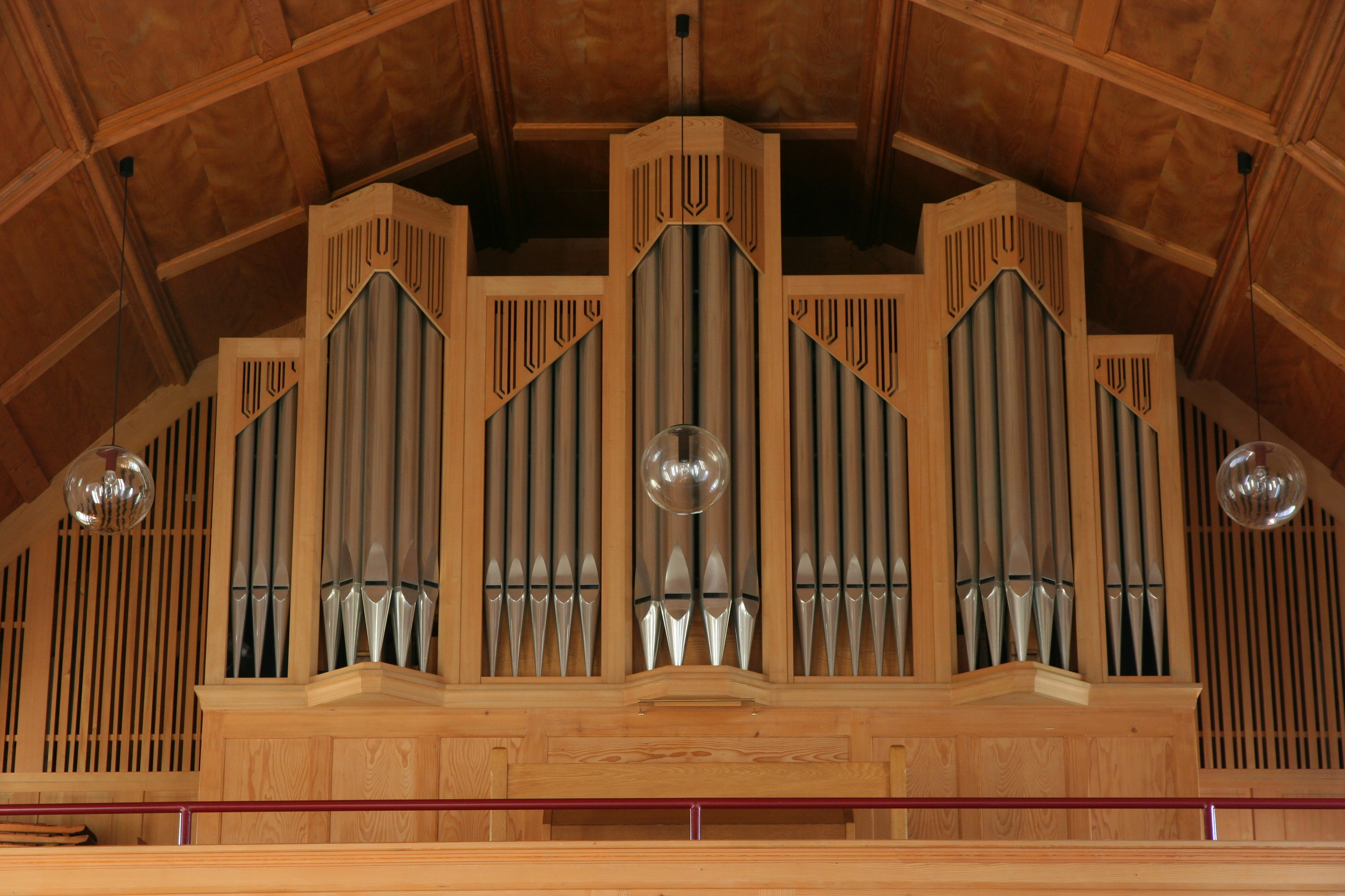 Evangelische Kirche St. Verena Müllheim TG